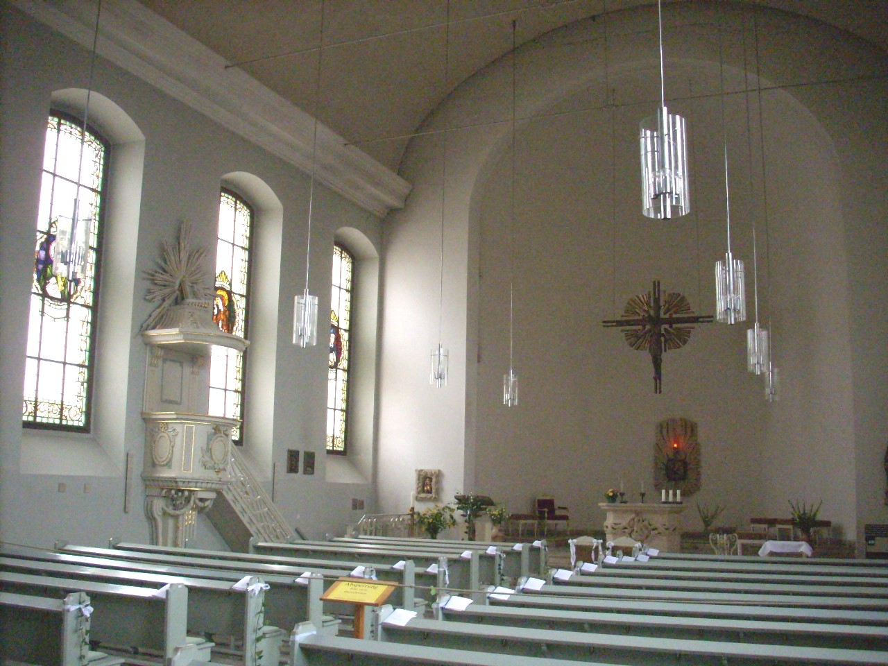 Schwerin, kath. Propsteikirche St. Anna, Innenansicht